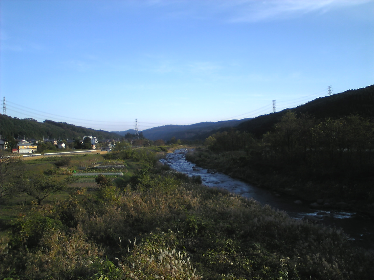 烏川